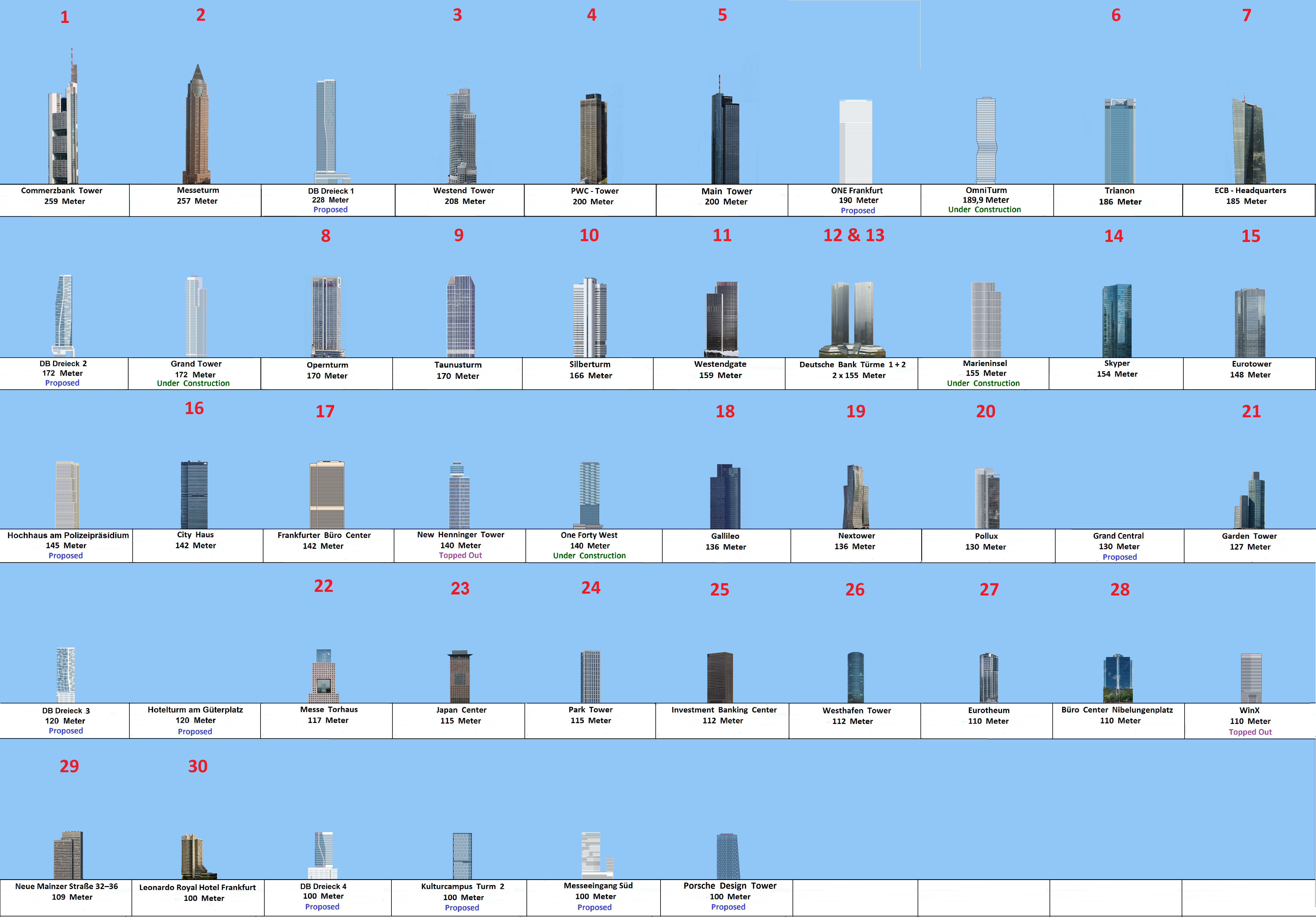 Diagramm aller Hochhäuser in Frankfurt ab 100 Meter.(fertiggestellt, in Bau, in Planung)